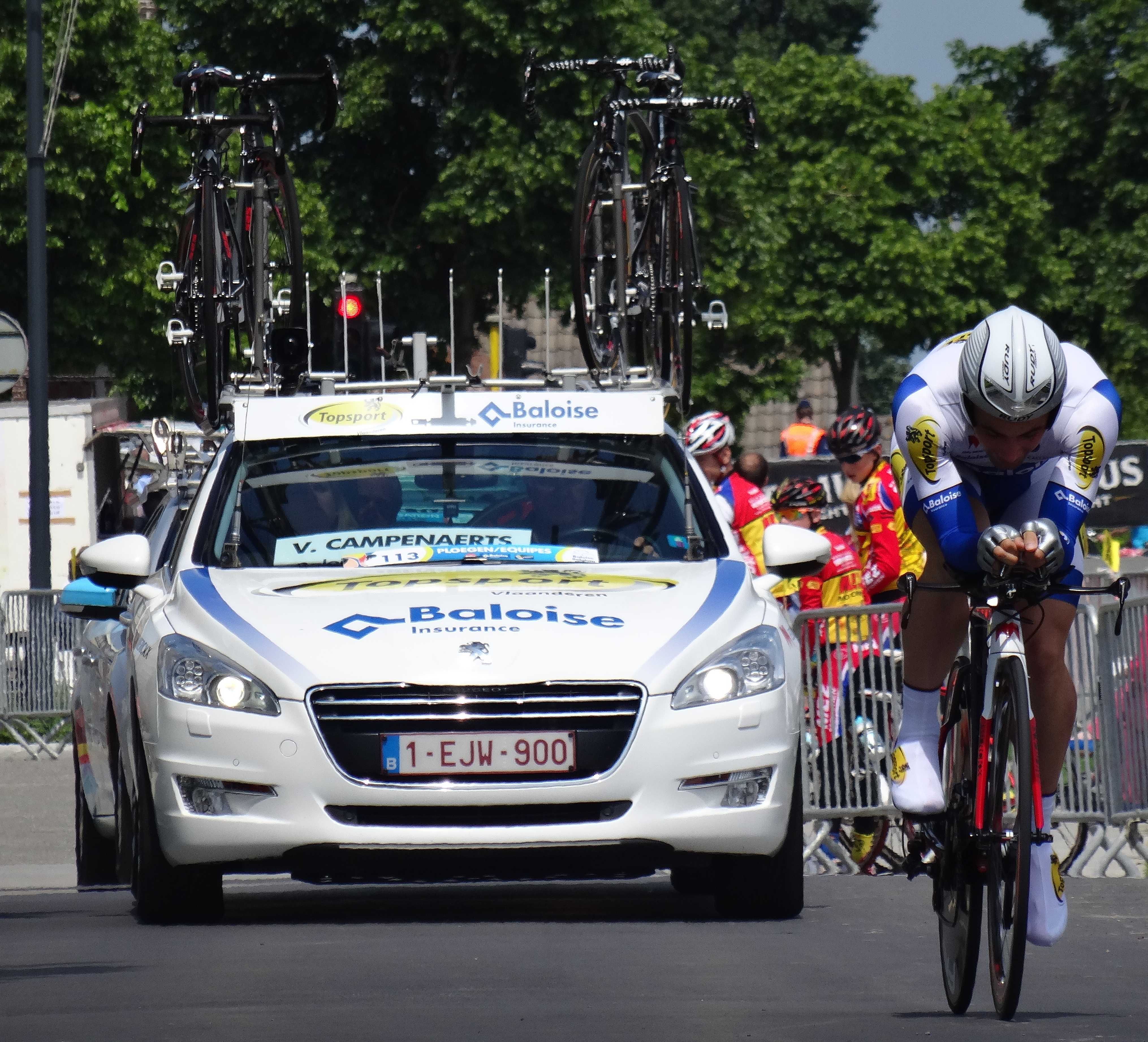 Reportage photographique réalisé le vendredi 30 mai à l'occasion du contre-la-montre individuel de la troisième étape du Tour de Belgique 2014 à Dixmude, Belgique.